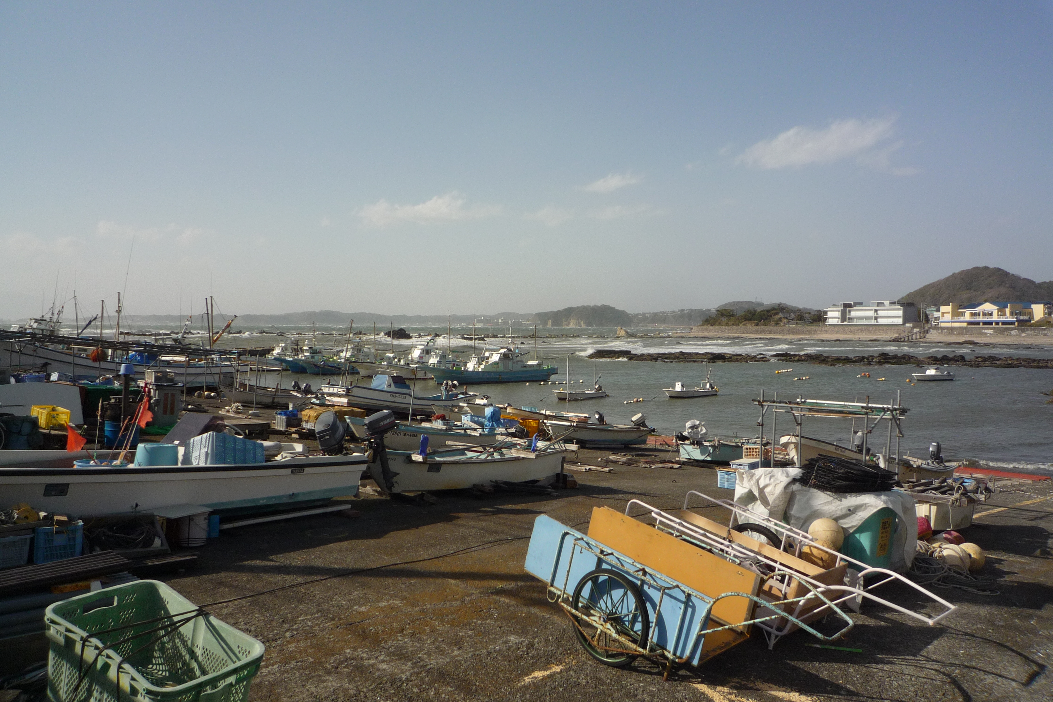 真名瀬漁港の画像